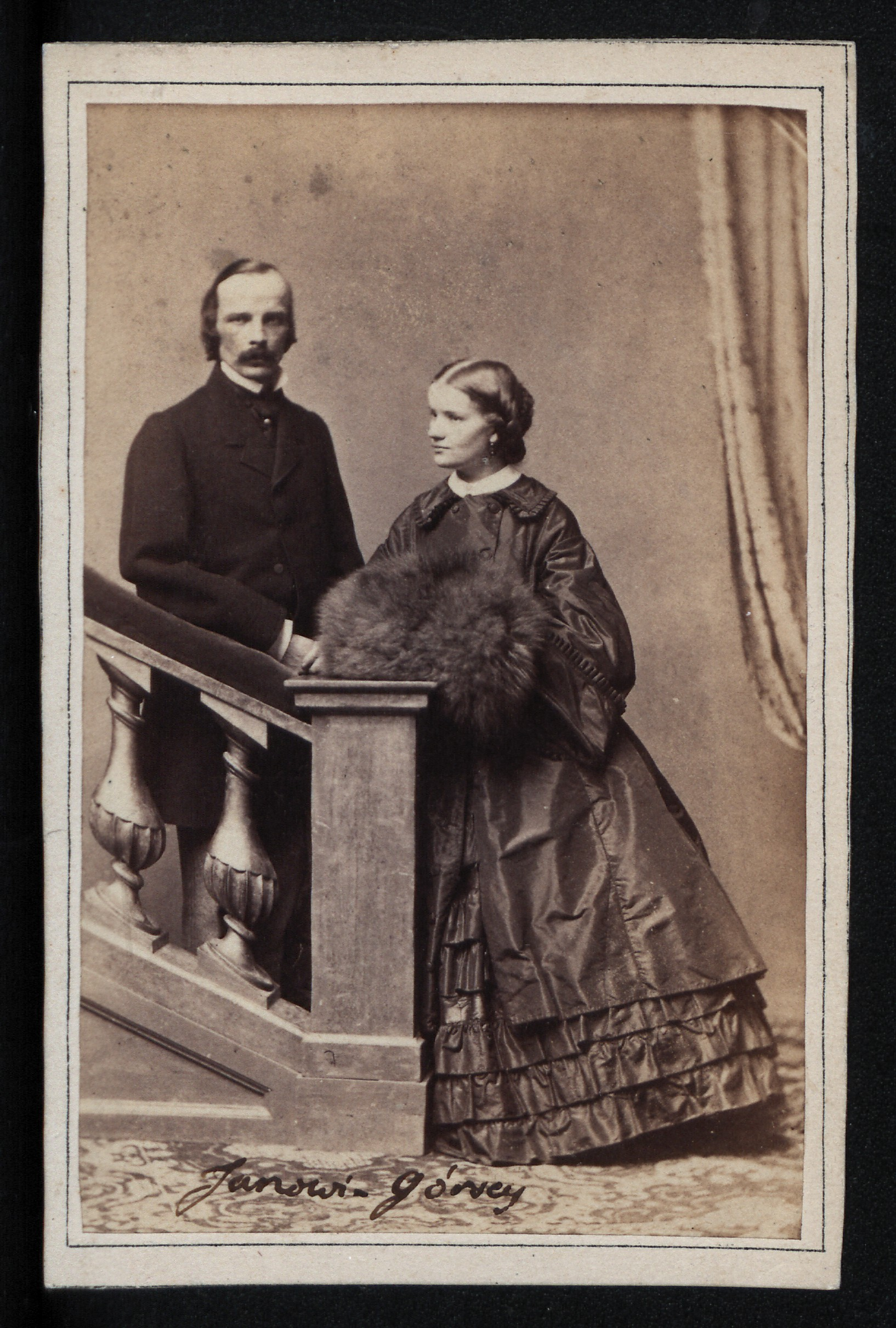 Jan Górski z żoną Marią, ok. 1861 r.